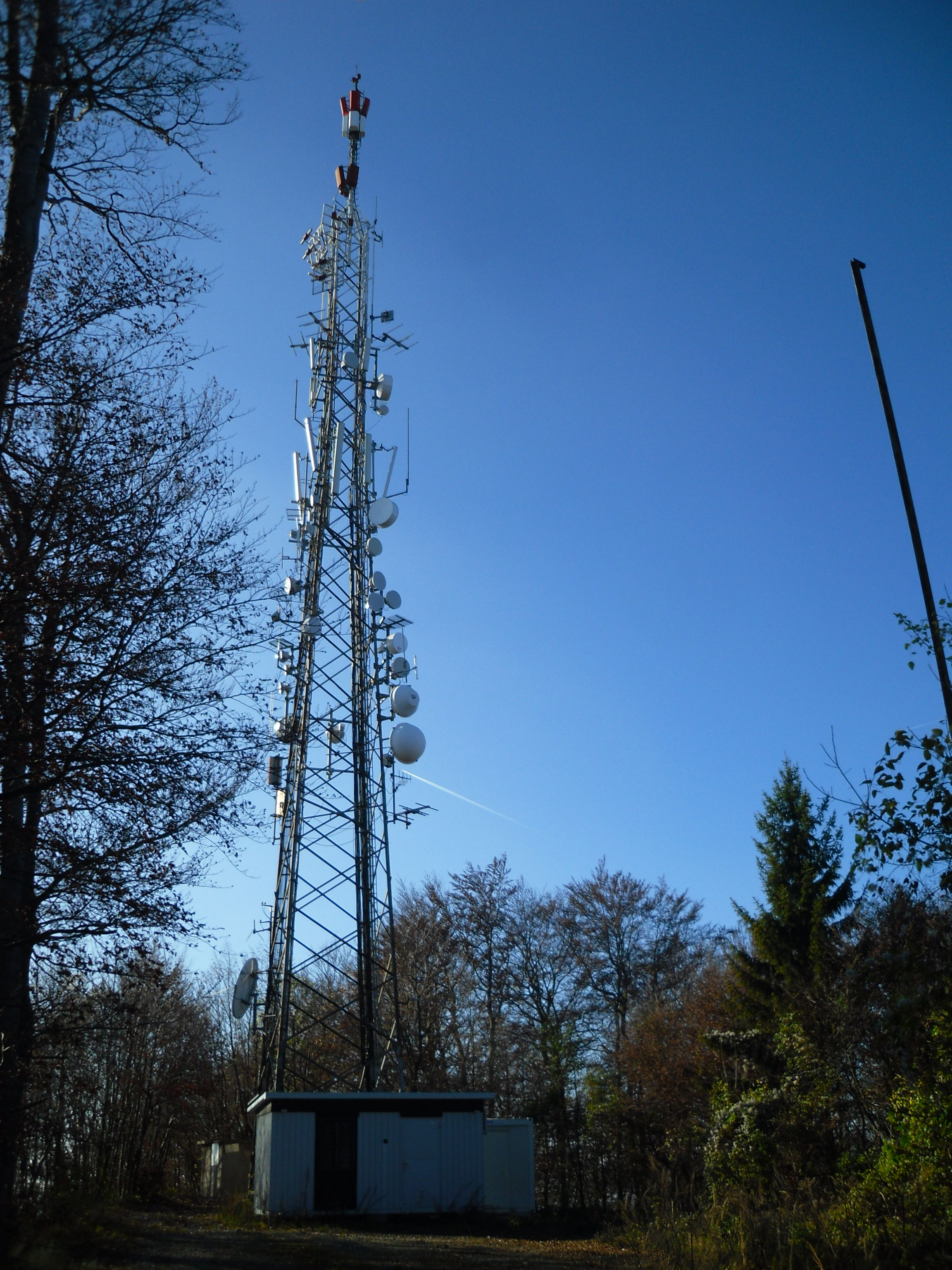 Malič